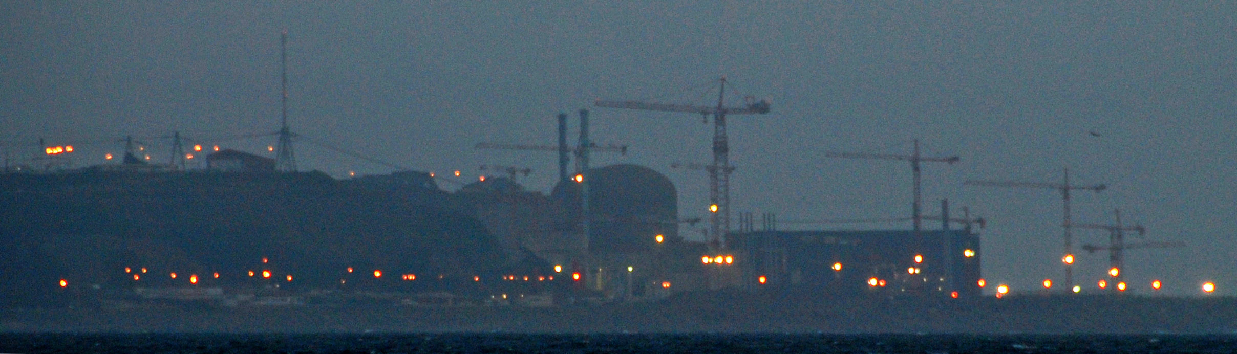 Kernkraftwerk Flamanville bei Nacht